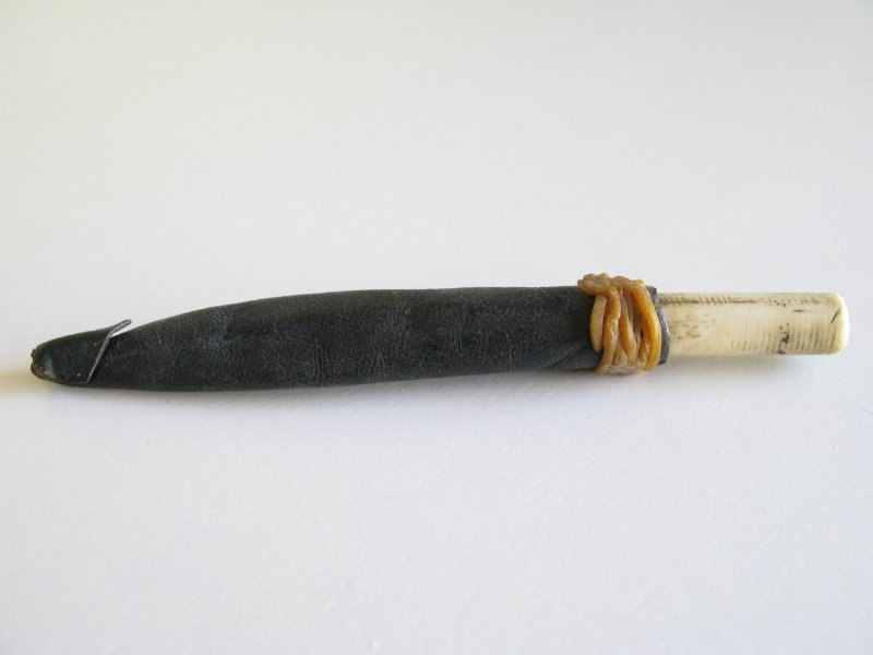 Vista general.